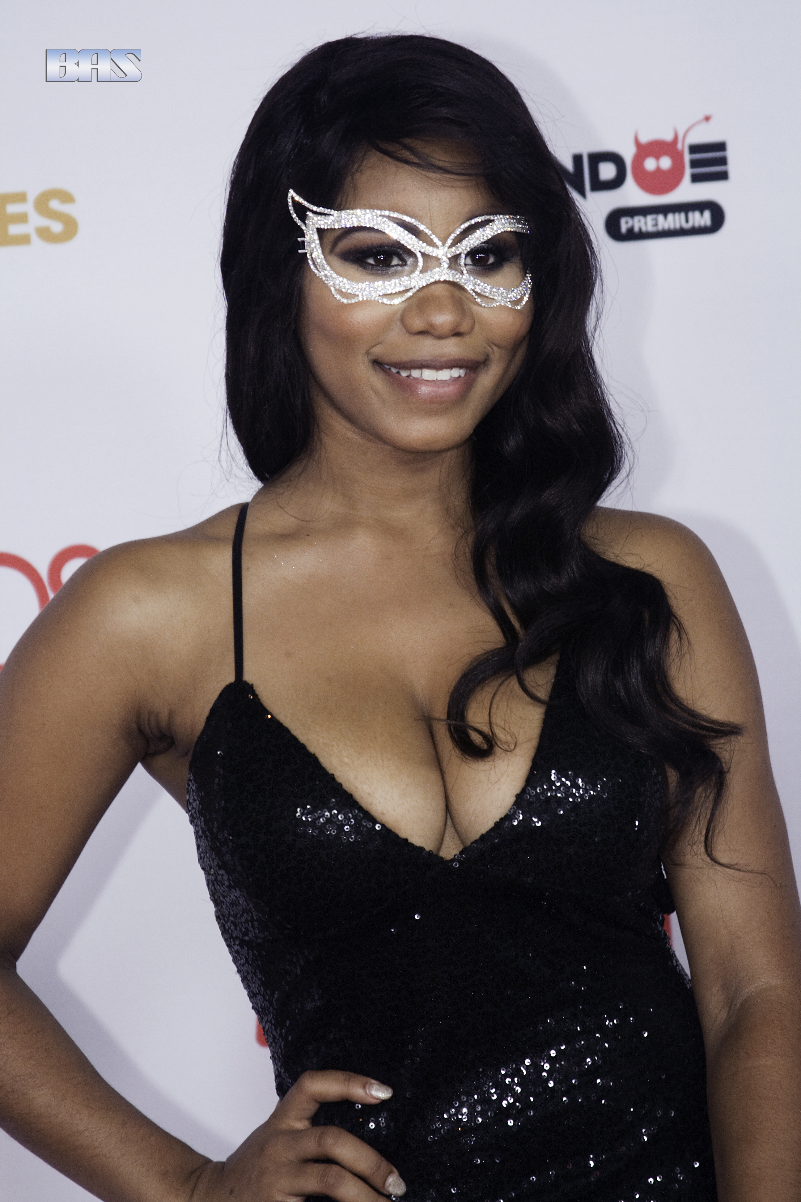 AVN16_0077bas